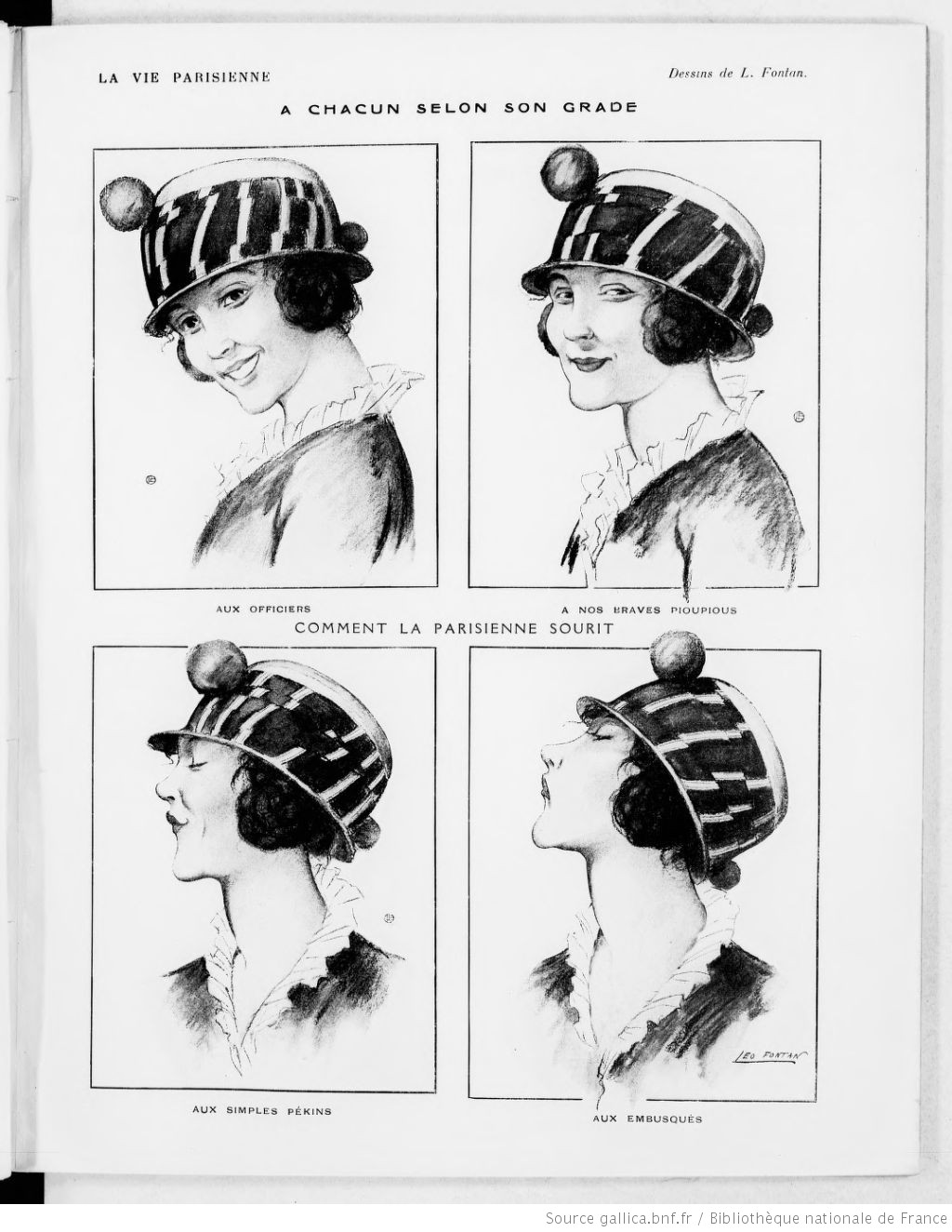 Vie Parisienne du 13 mars 1915. A chacun selon son grade